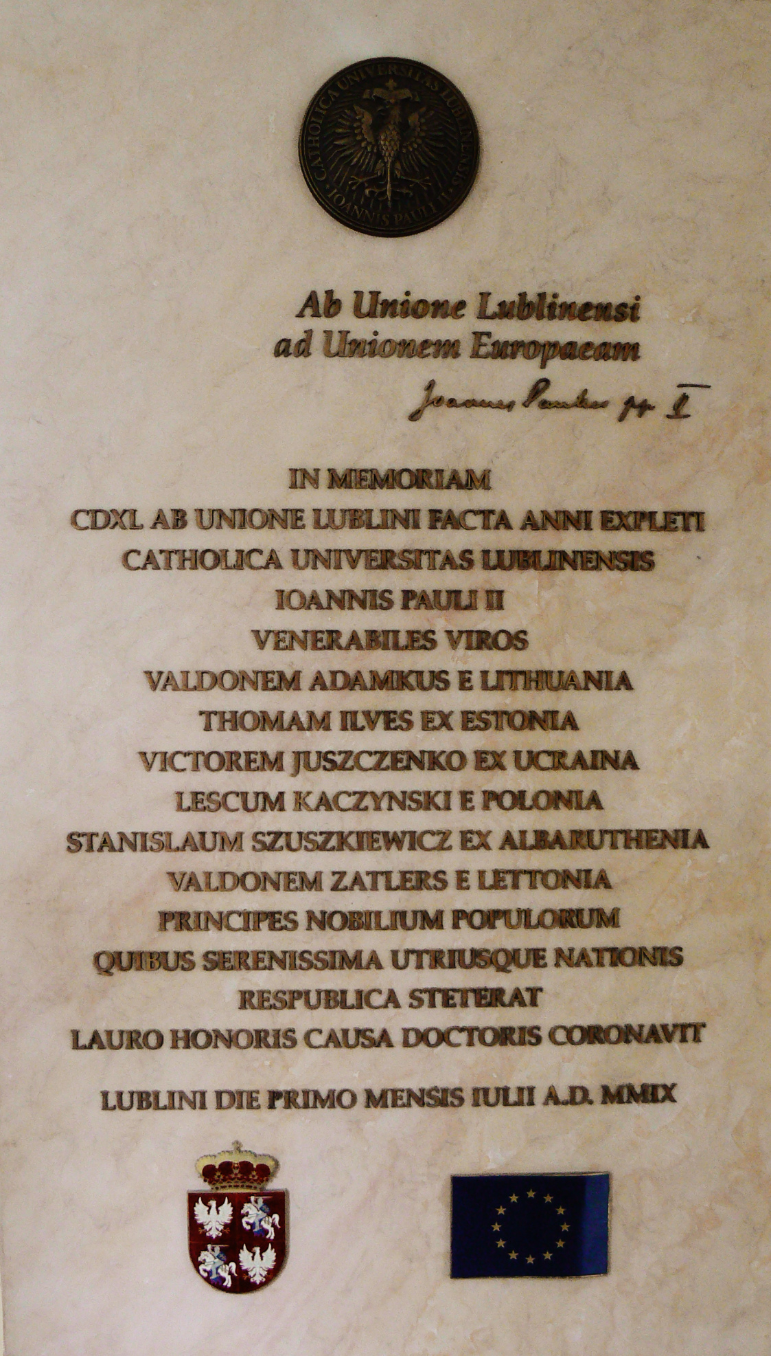 union kul